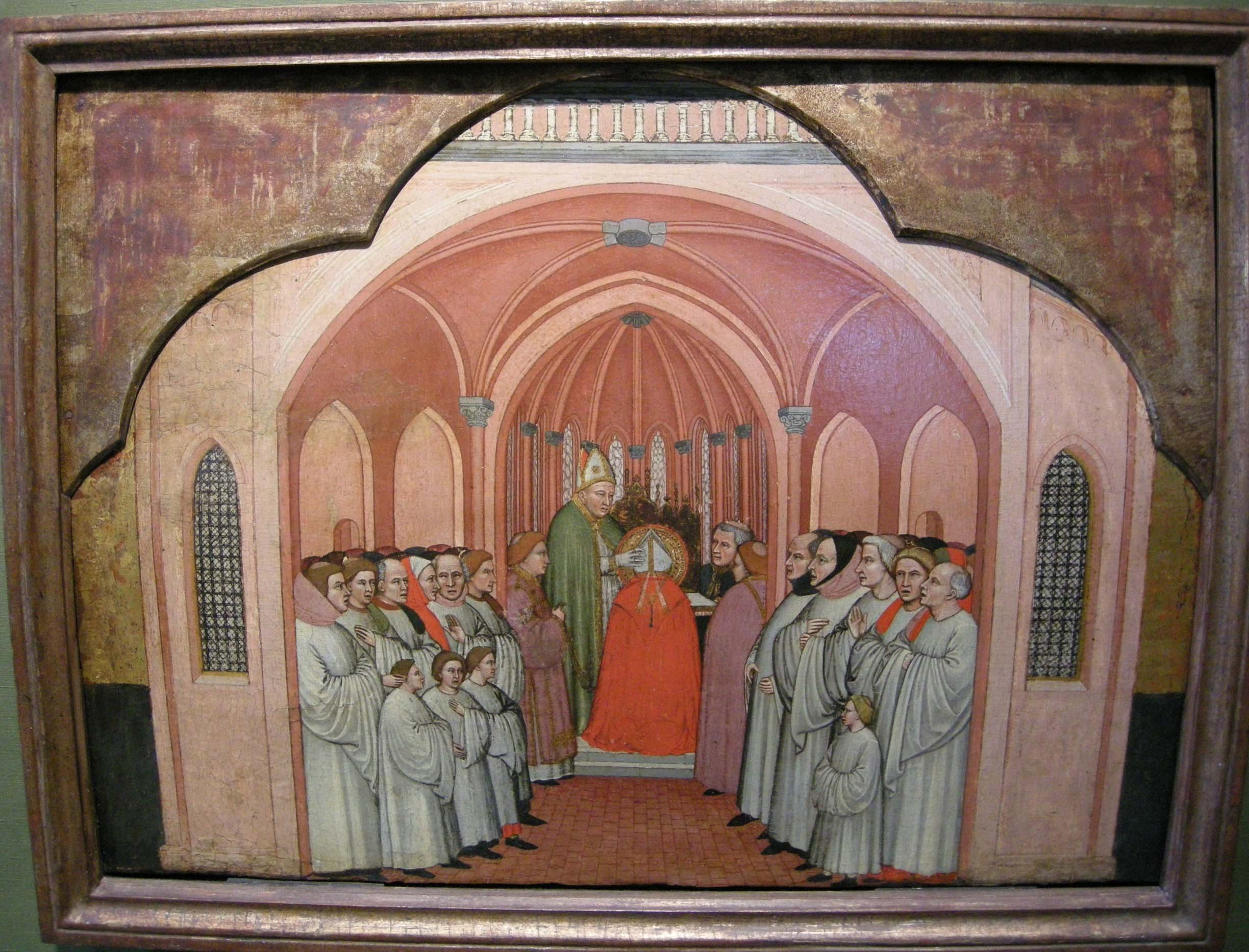 Martino da verona (attr.), consacrazione di sant'eligio, 1390 ca